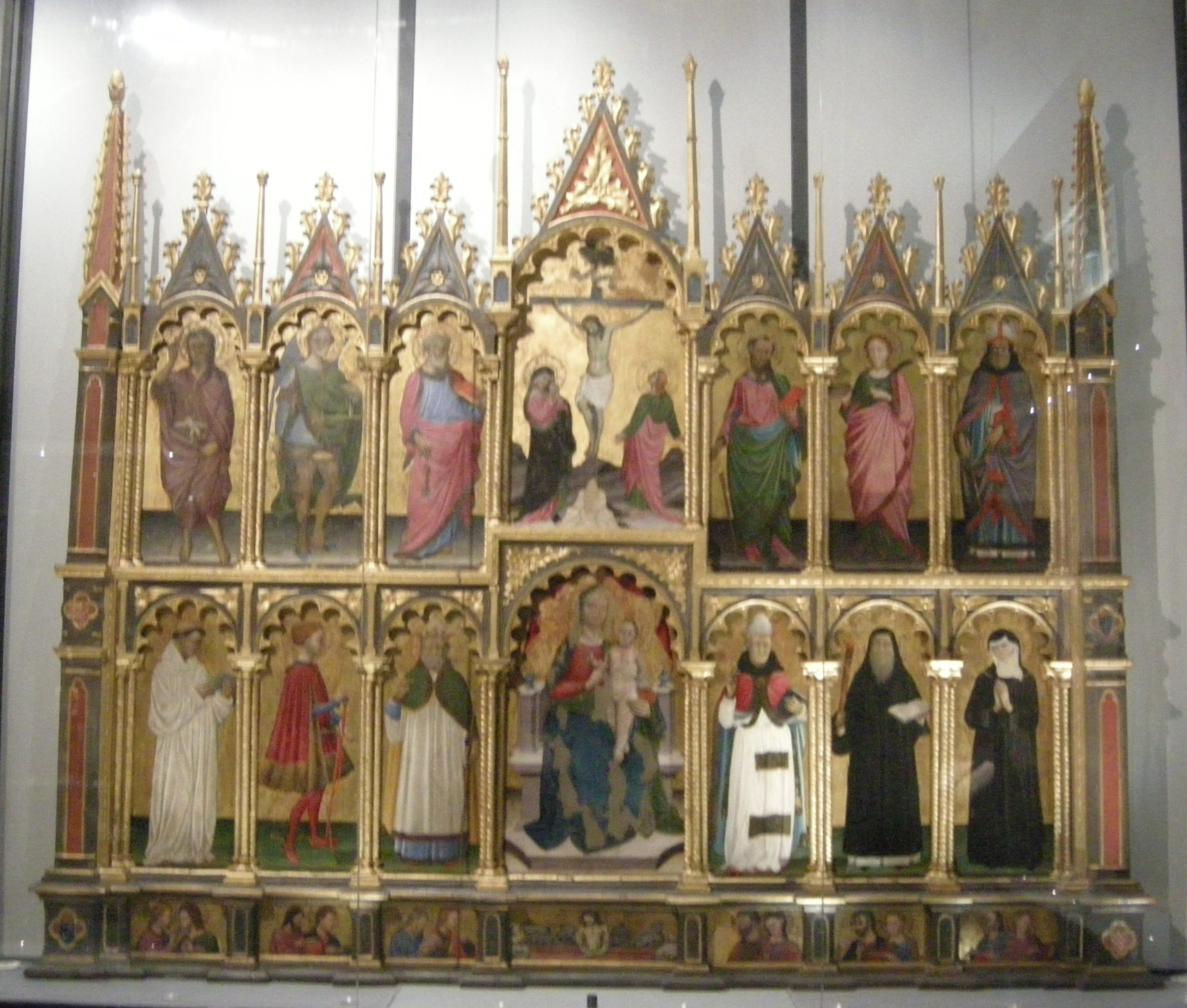 Museo diocesano nonantola, polittico di Michele di Matteo Lambertini (inizio XV sec.)